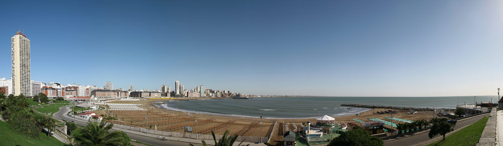 panoramica mar del plata